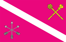 Прапор Чигиринського району